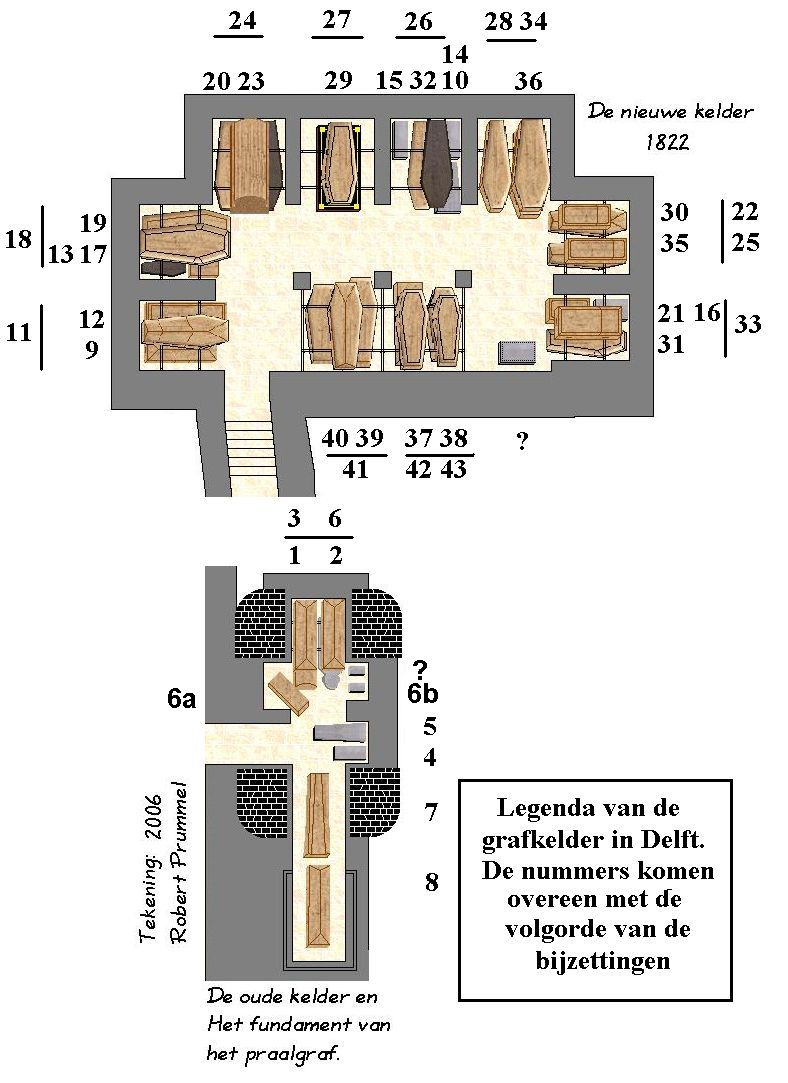 Grafkelder in Delft, legenda met volgorde van de bijzetting